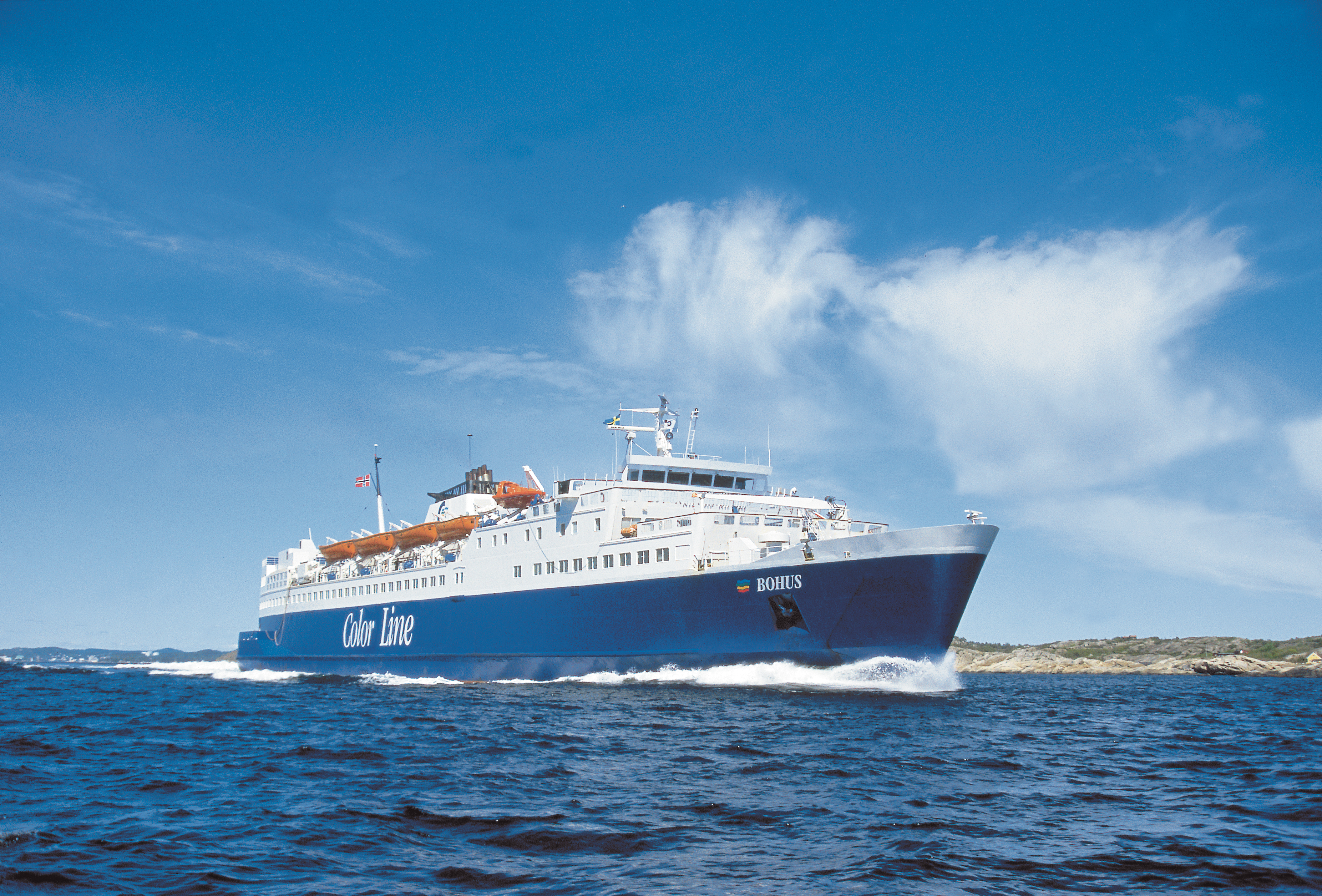 Bohus trafikkerer linjen Color Line betjener mellom Sandefjord – Strømstad. Bohus sailes on the route Color Line operate between Sandefjord – Strømstad. Photo: Color Line